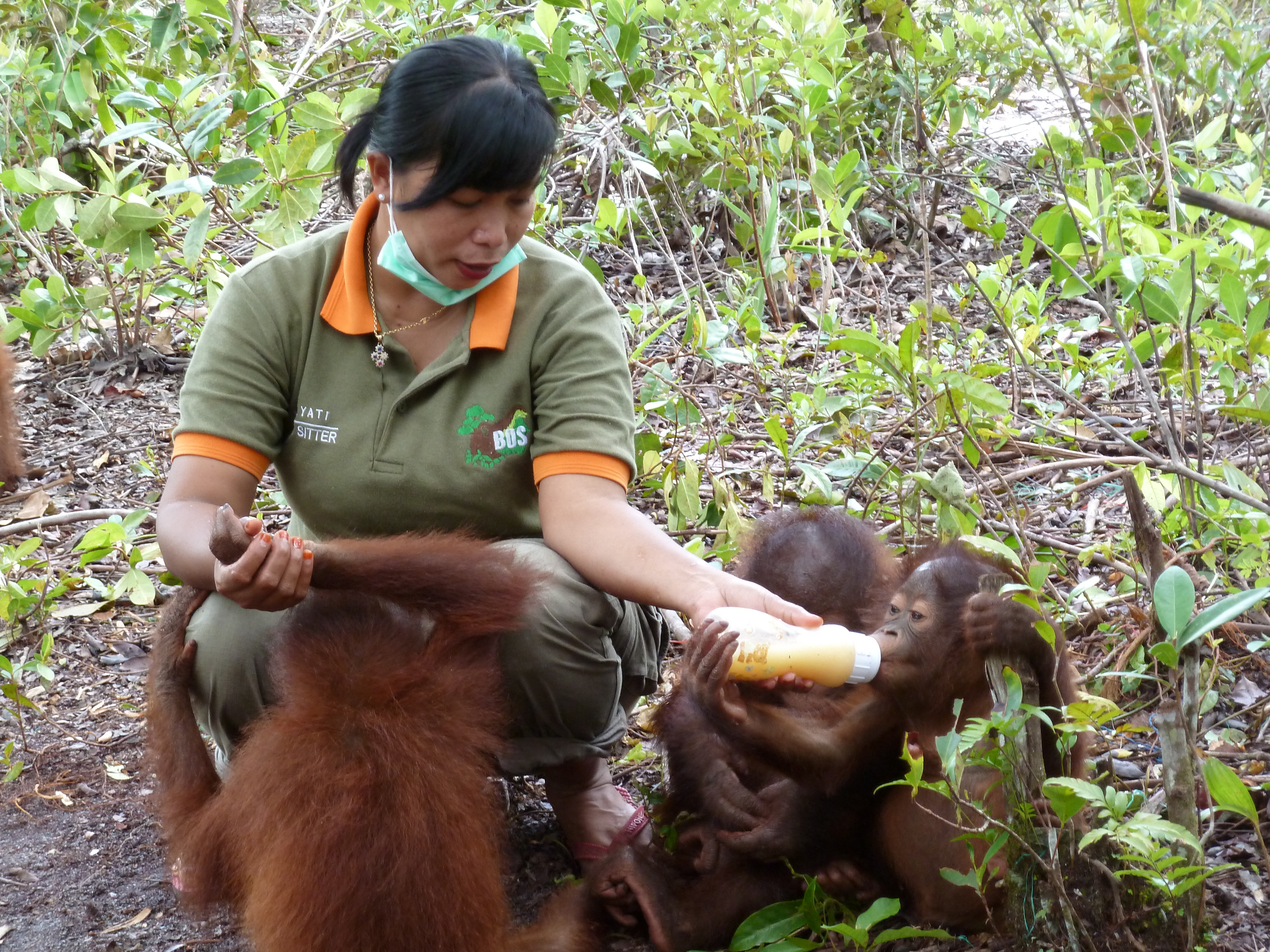 Die Aufzucht verwaister junger Orang-Utans in Borneo.